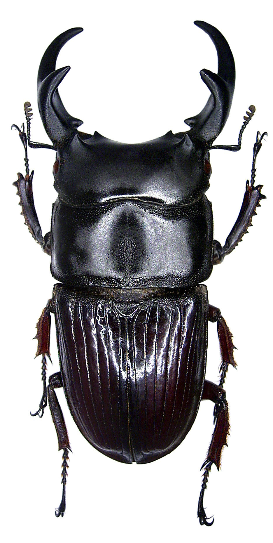 Familie: Lucanidae Groesse: 21,2-54,9 mm Verbreitung: Sumatra, Malaysia, Borneo, Java Fundort: Indonesien, Sumatra, 2006 det. A.Skale, 2006 Foto: U.Schmidt, 2007